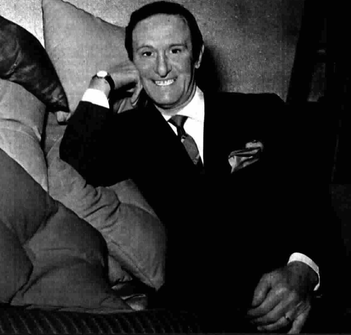 Italian presenter Nunzio Filogamo